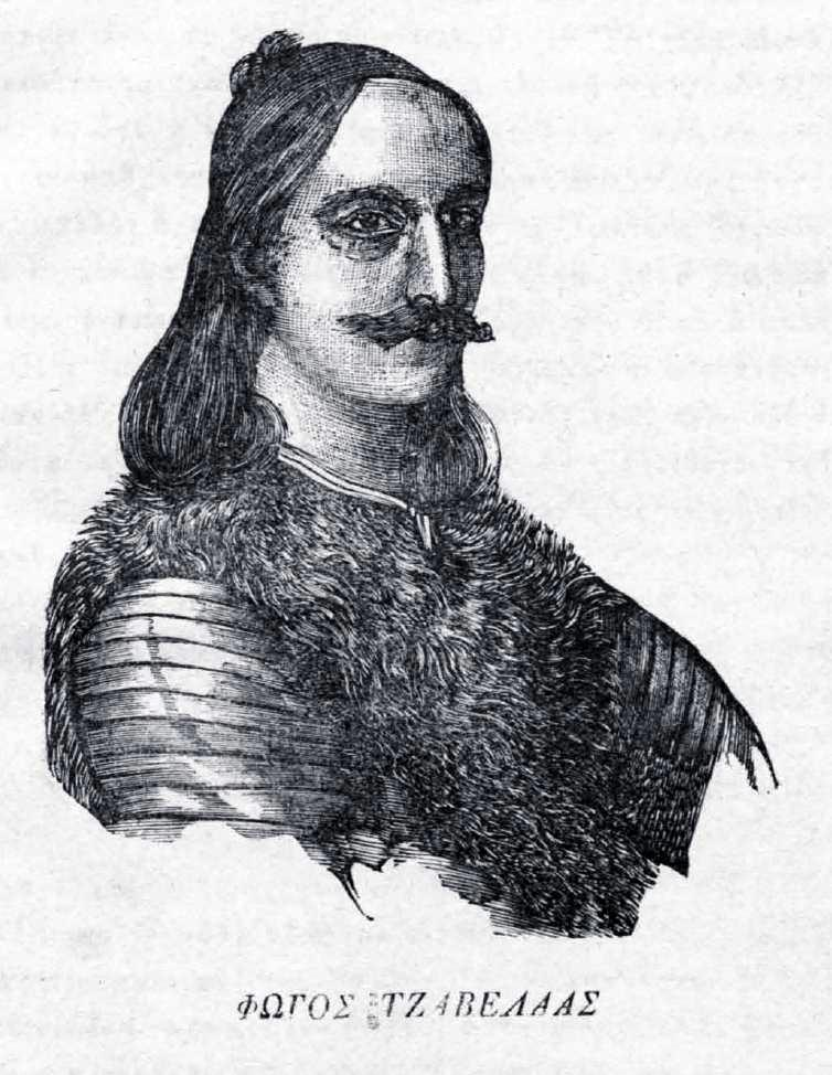 greek warrior